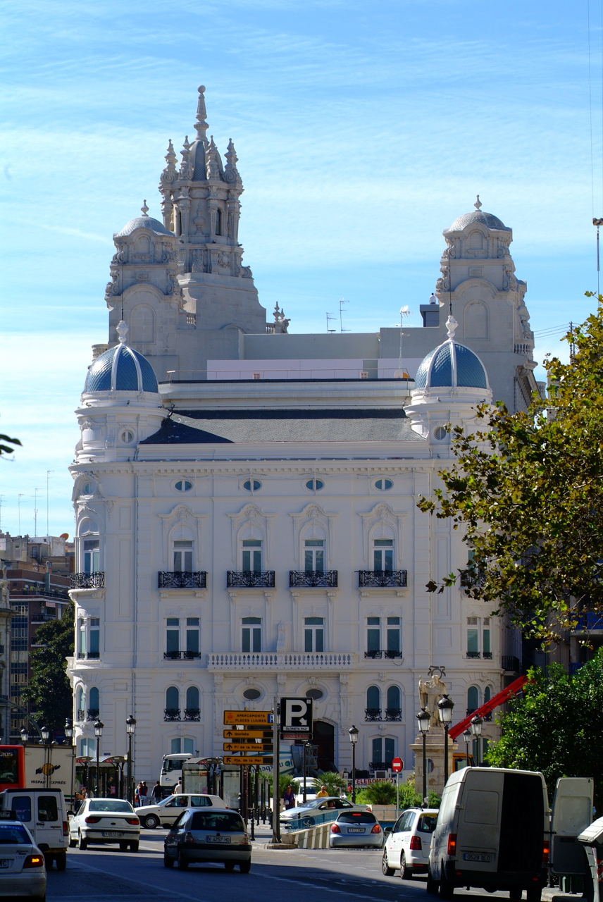 Centre Cultural Bancaixa